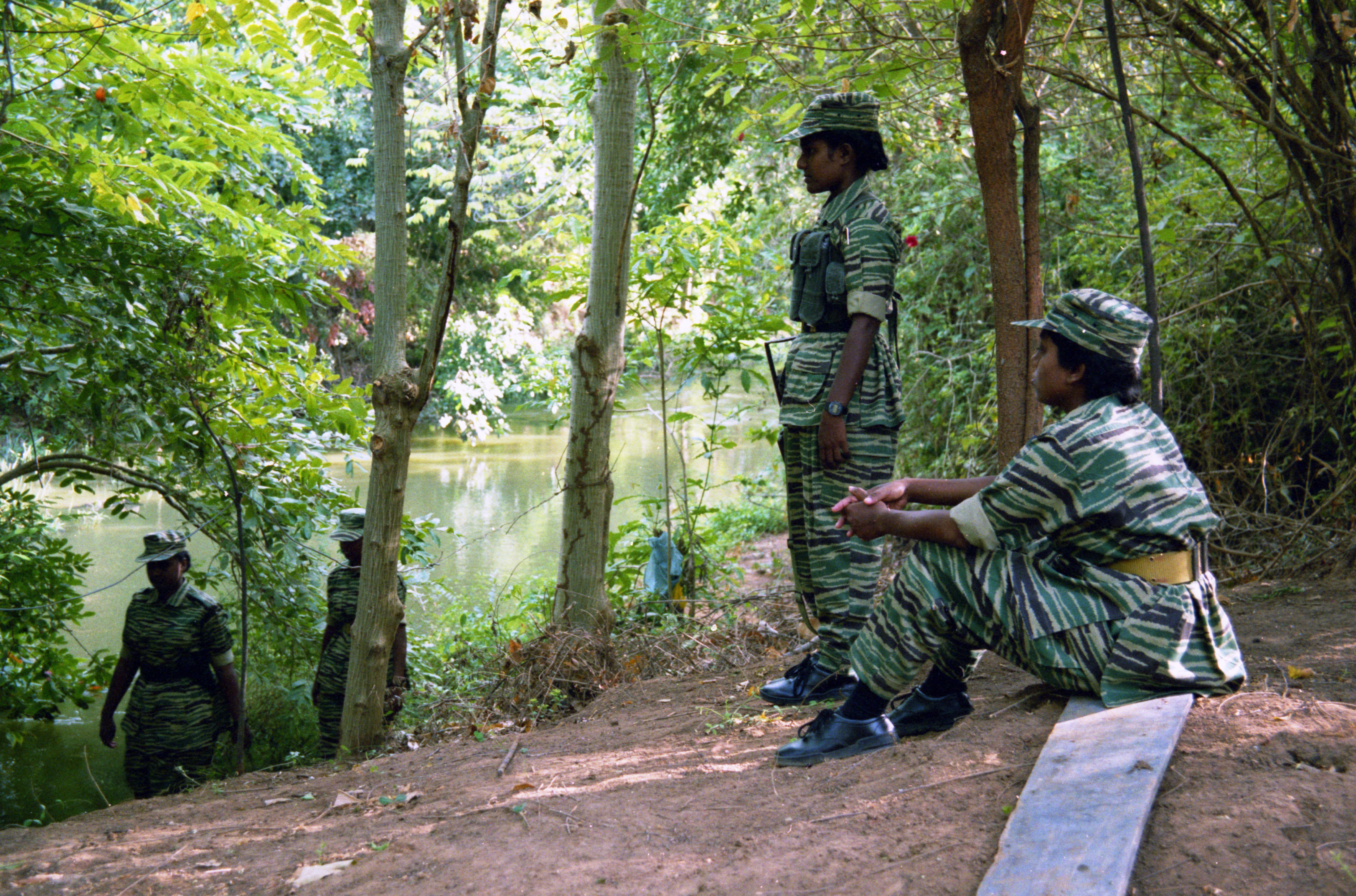 Women of the LTTE 2, Northern Sri Lanka, 2002